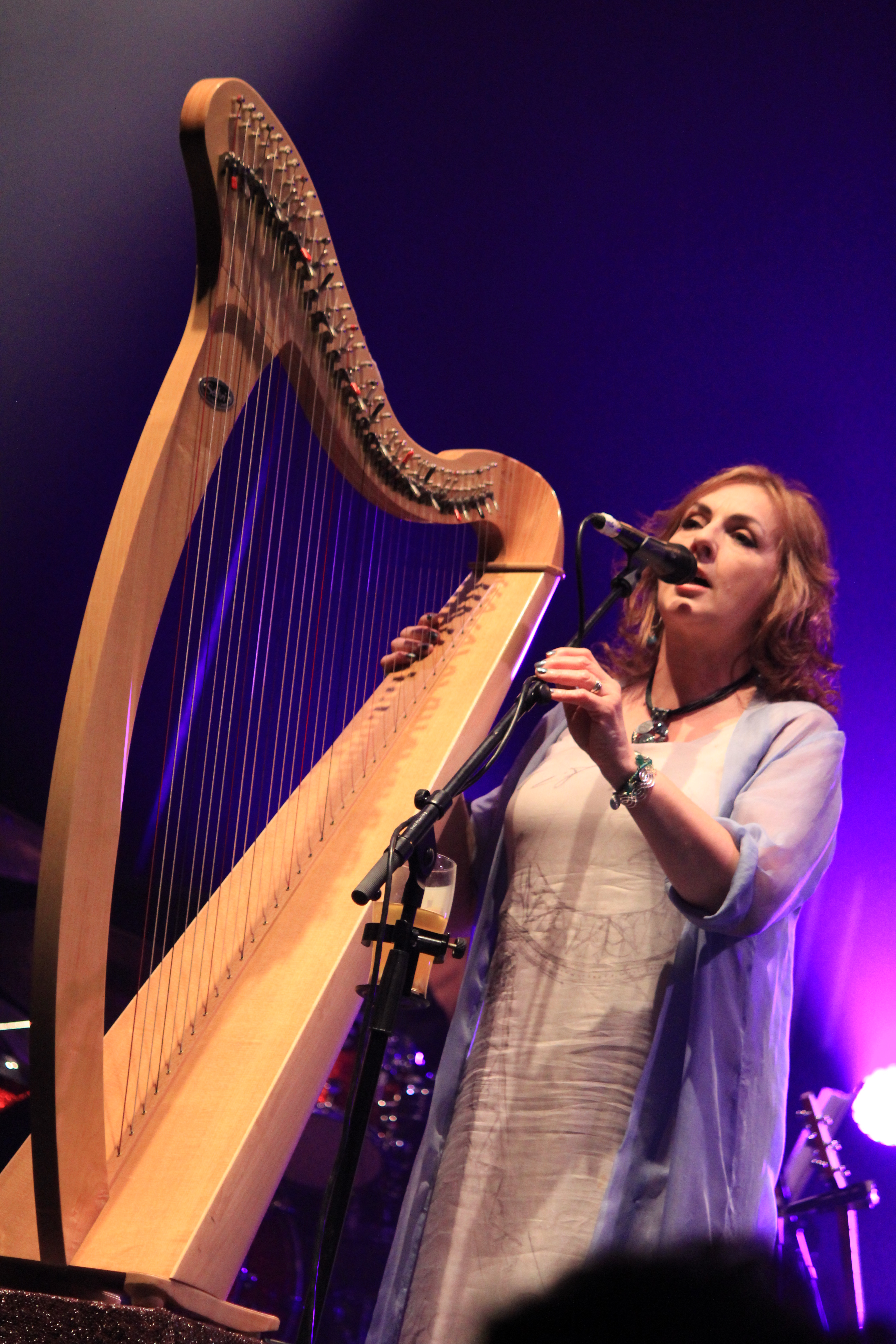 Moya Brennan pendant le concert de Clannad lors du festival interceltique de Lorient 2013